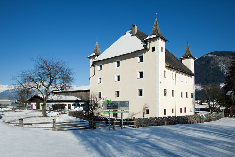 Schloss Saalhof Winteransicht